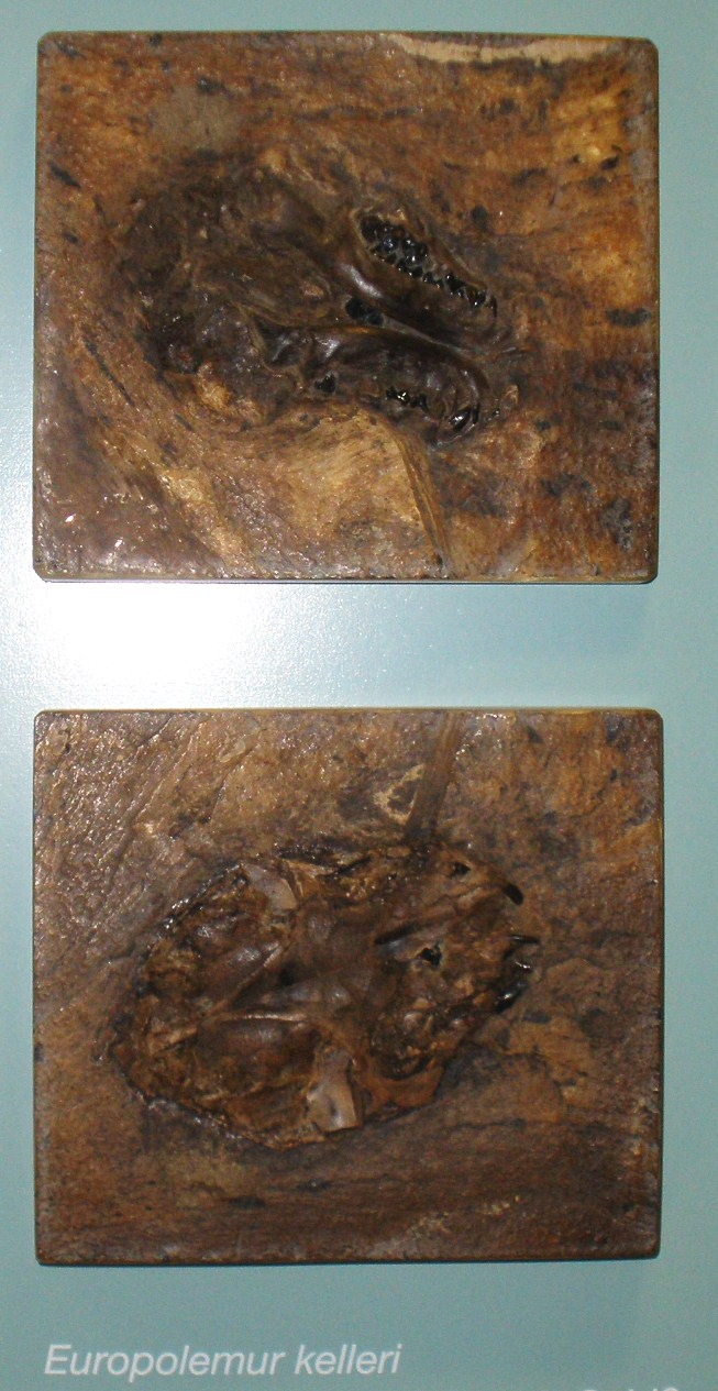 Fossil of Europolemur, an extinct primate- Took the photo at Senckenberg Museum of Frankfurt